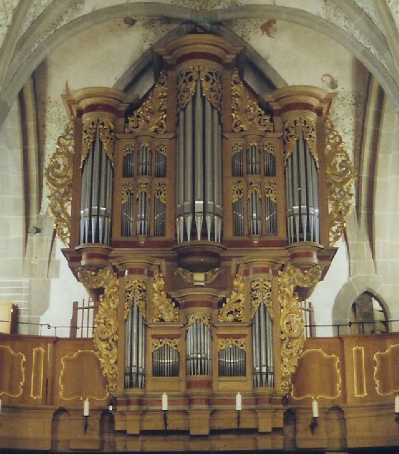 Johann Michael Stumm organ (1739) in Matthiaskirche Bad Sobernheim